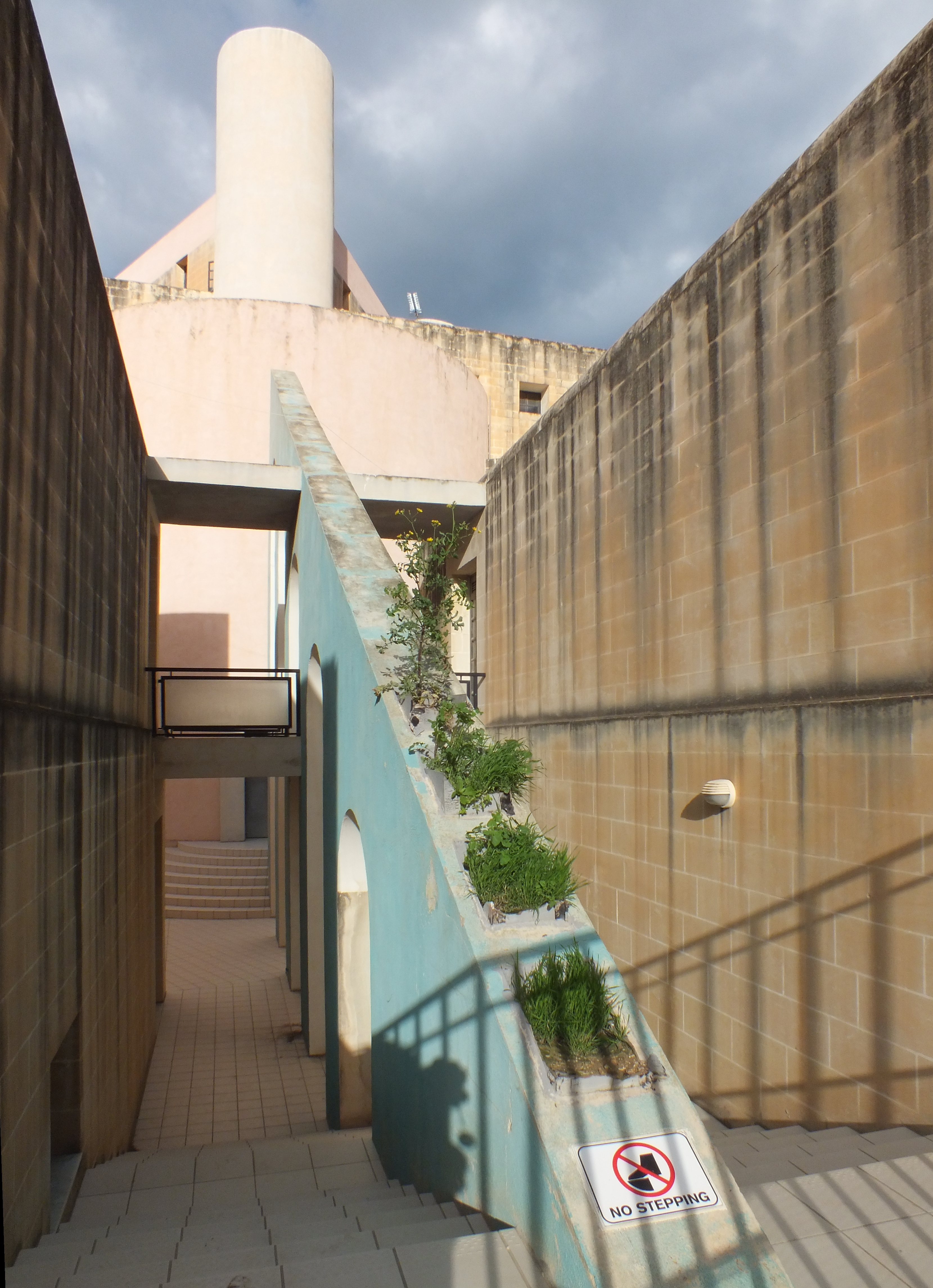 Malta, St. Franziskus-Kirche (Church of St Francis of Assisi), Ortsteil Qawra von St Pauls bay